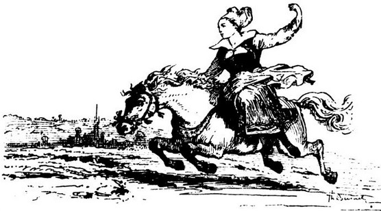 Illustration de Théophile Busnel pour le conte d'Emile Souvestre, la Groac'h de l'ïle du Lok